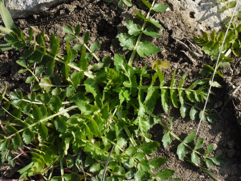 rosette d'un persil des moissons (Petroselinum segetum)